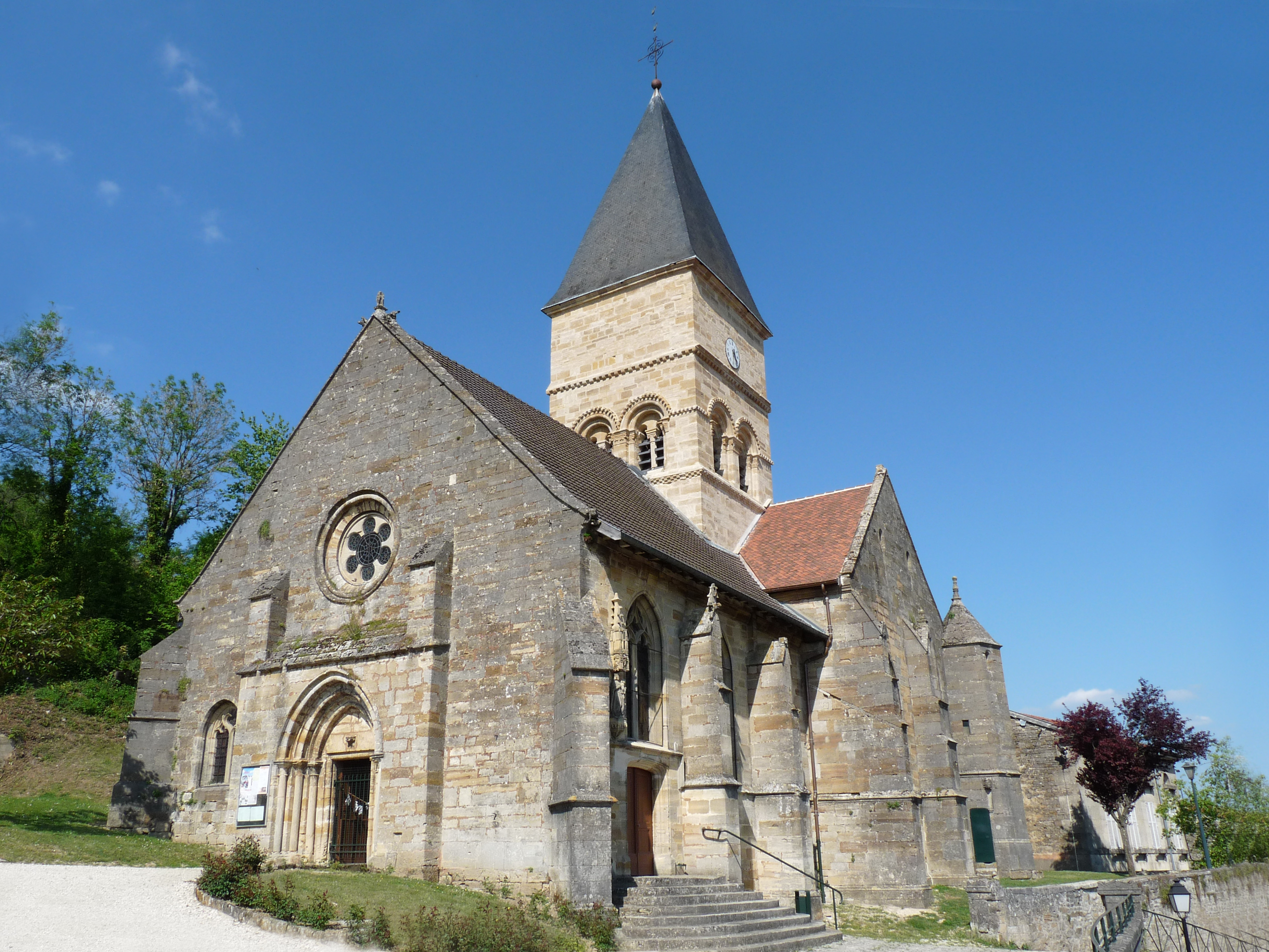 Eglise Saint-Menge de Trémont-sur-Saulx (Meuse).